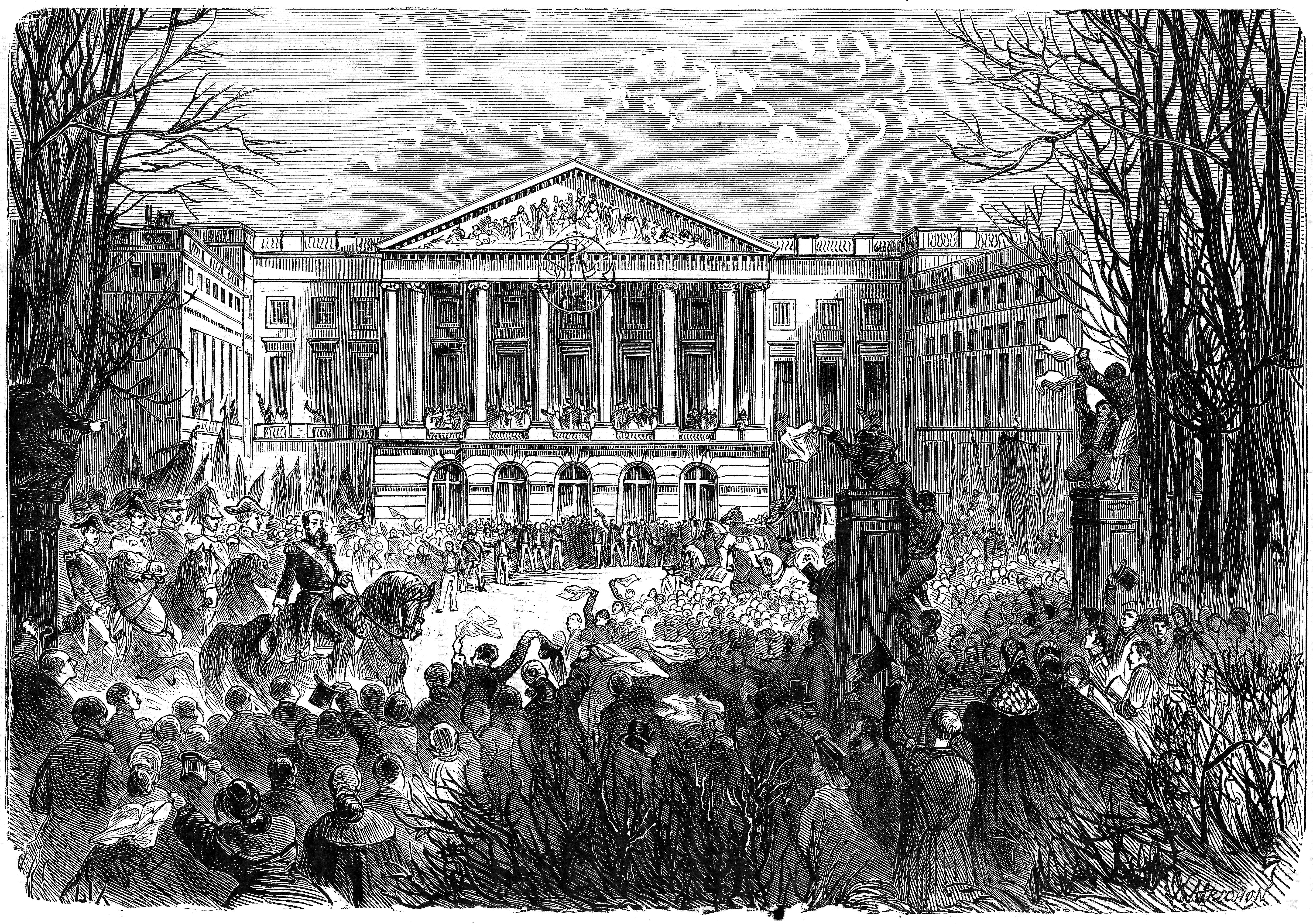 Arrivée de Léopold II devant le Palais de la Nation le jour de son avènement, Bruxelles, le 17 décembre 1865. — Léopold est escorté à cheval par son état-major, par son frère Philippe, comte de Flandre, et par l’archiduc Joseph d’Autriche, frère de la Reine, dans le cortège qui le mène du château de Laeken au Palais de la Nation (Parlement). À midi et demi, Léopold arrive au Palais de la Nation, où aura lieu la prestation du serment constitutionnel. La garde civique et les troupes de la garnison sont sous les armes dans les rues par lesquelles le Roi est passé. Le bataillon des chasseurs-éclaireurs, la batterie d’artillerie de la garde civique de Bruxelles, les blessés et les décorés de septembre 1830 occupent l’entrée du Palais de la Nation.